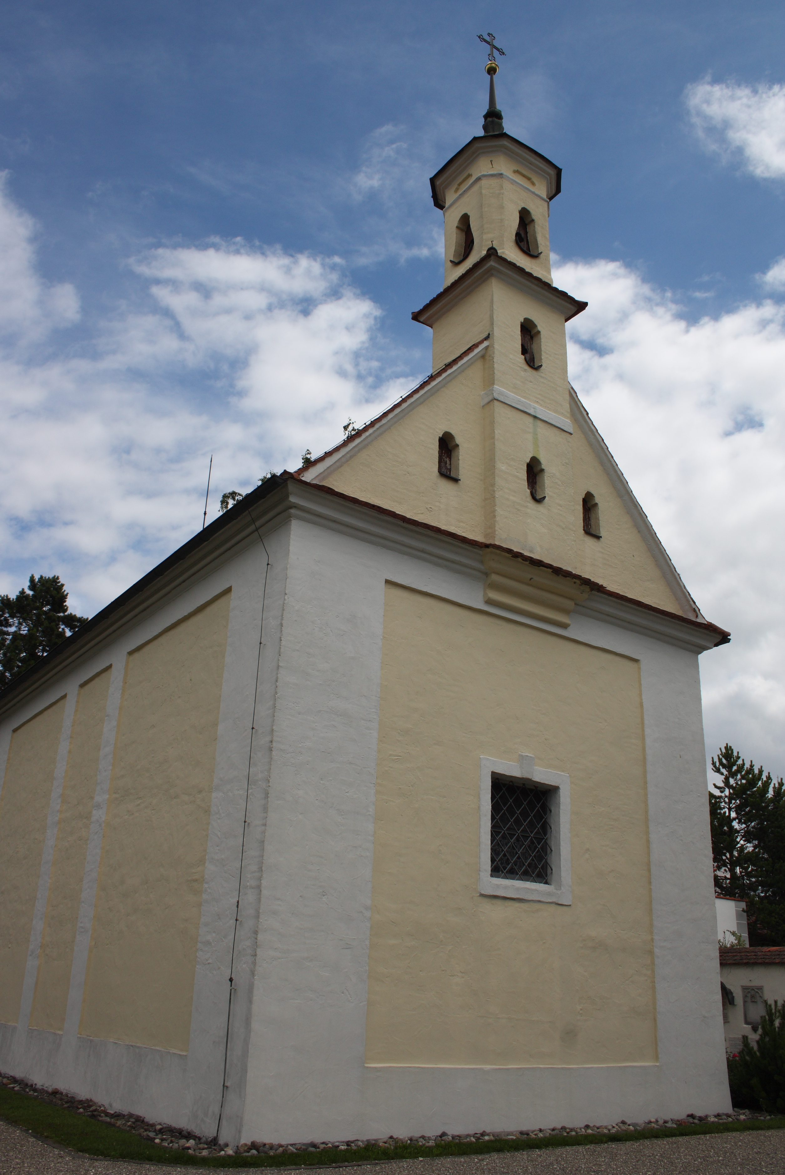 Katholische Loretokapelle in Obermedlingen, einem Ortsteil von Medlingen im Landkreis Dillingen an der Donau (Bayern), 1757 erbaut